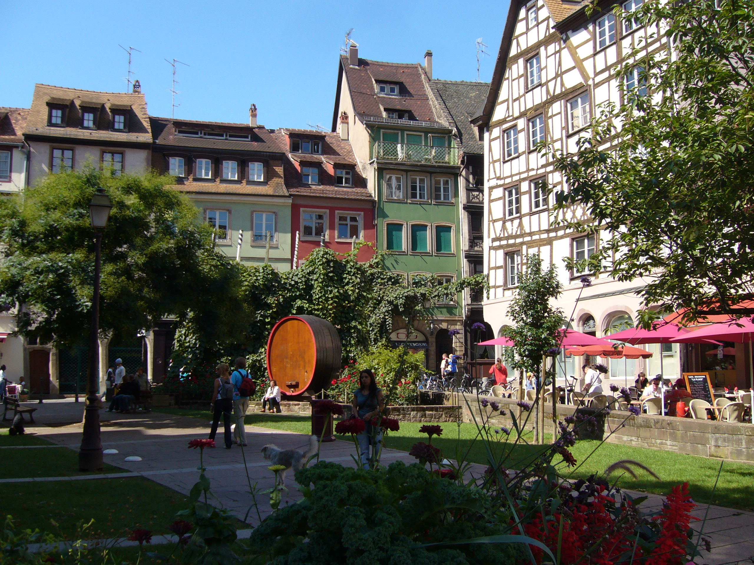 La Place des Tripiers